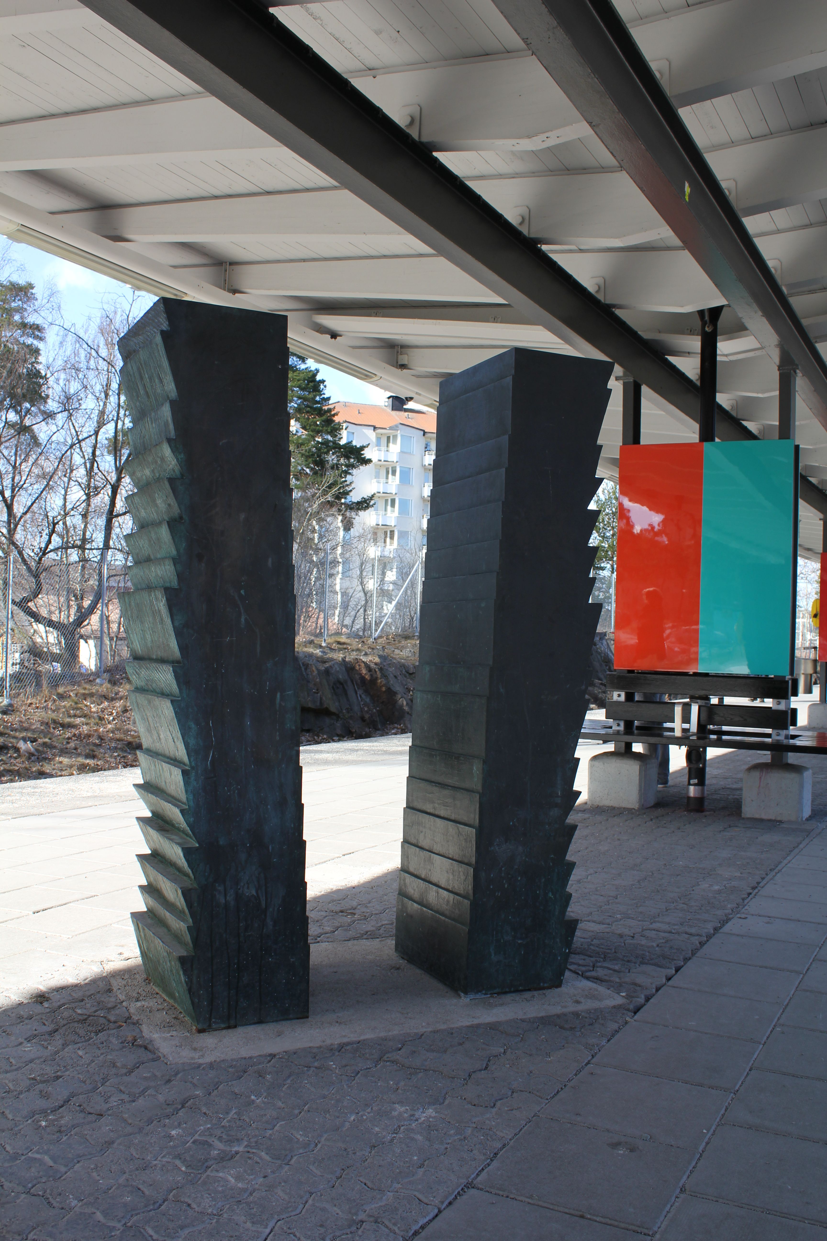 Bronsskulptur av Hanns Karlewski, rest 1995, på Hökarängens tunnelbanestation.